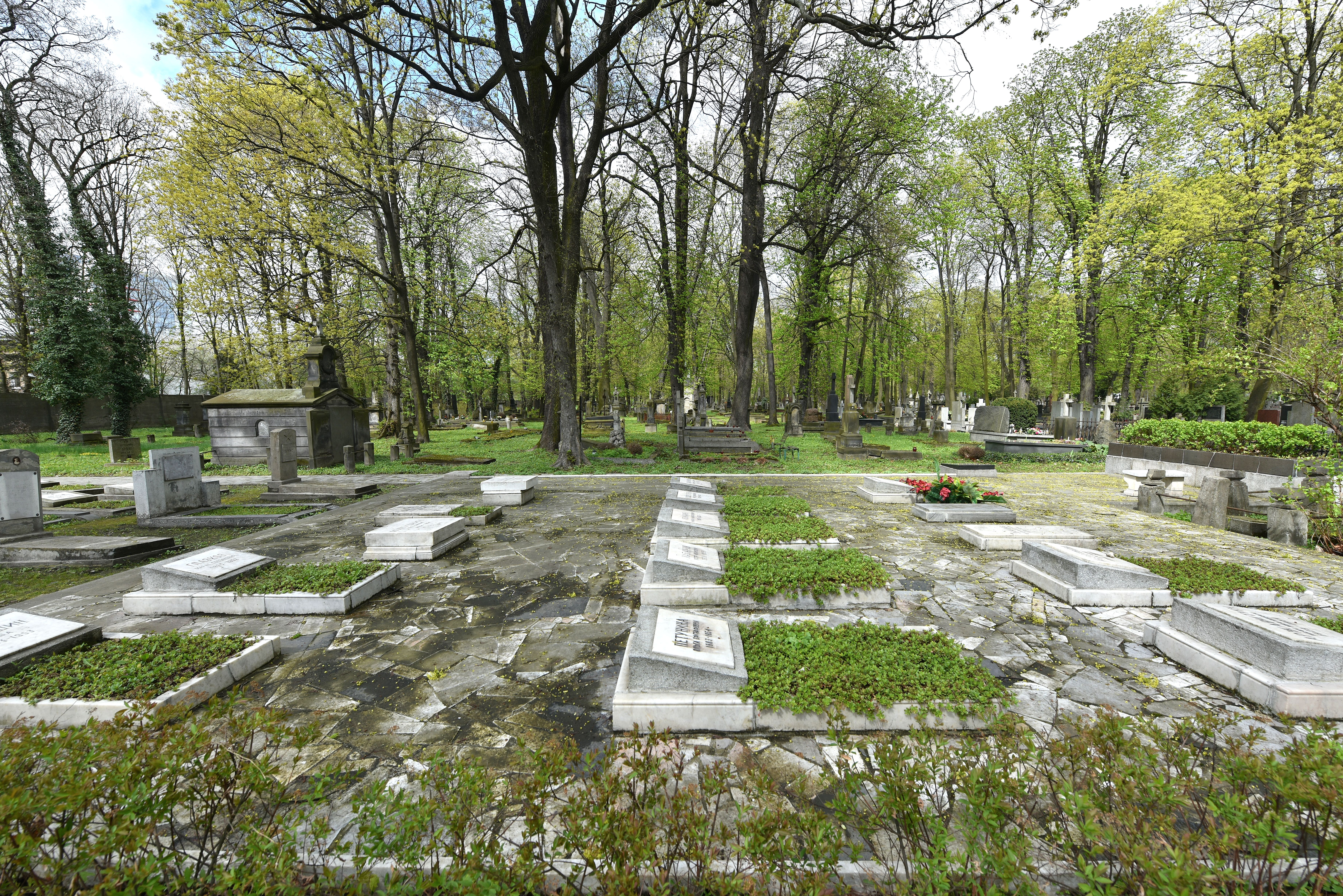 Kwatera budowniczych Pałacu Kultury i Nauki na cmentarzu prawosławnym w Warszawie